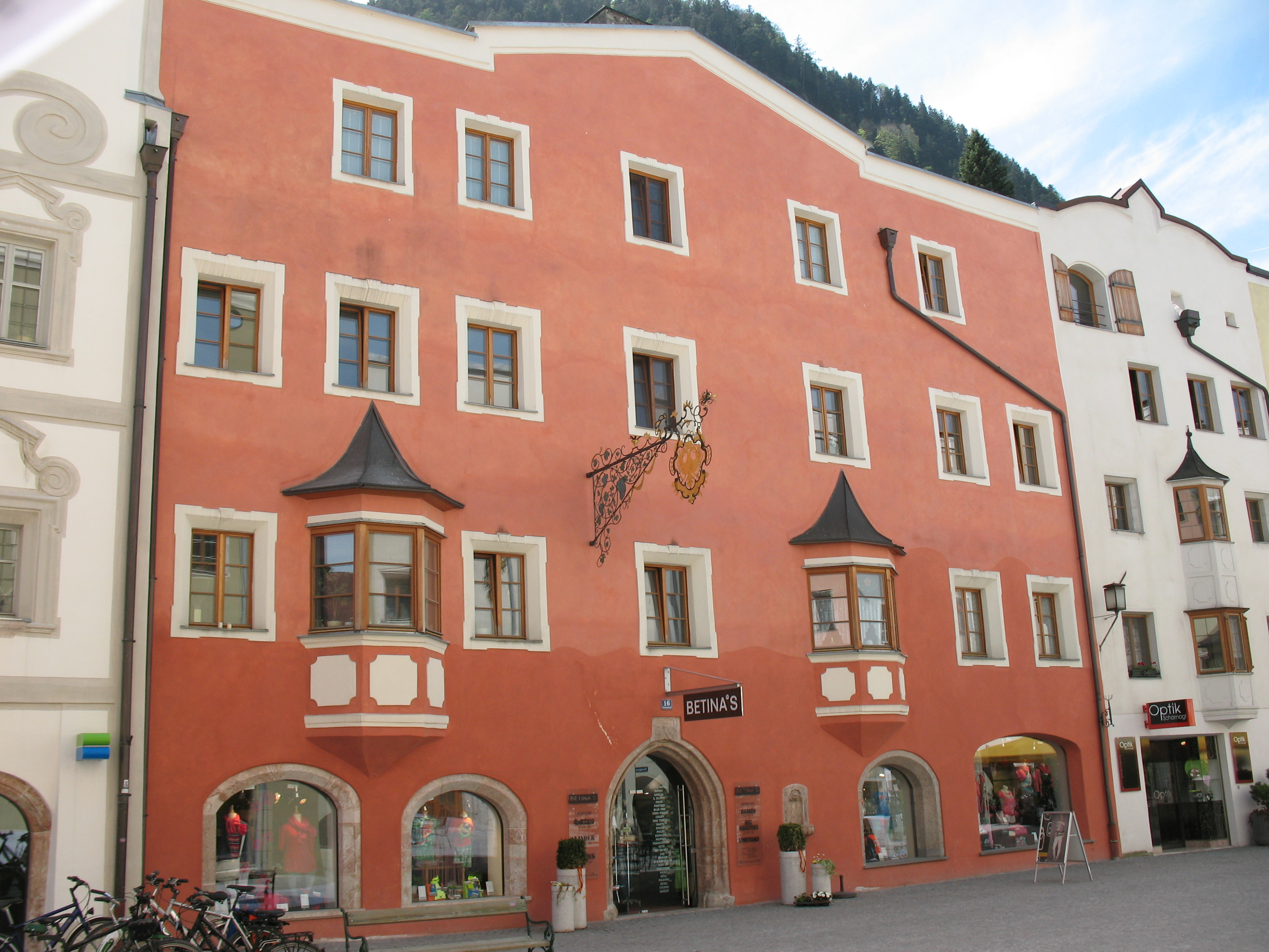 Gasthaus Ledererbräu